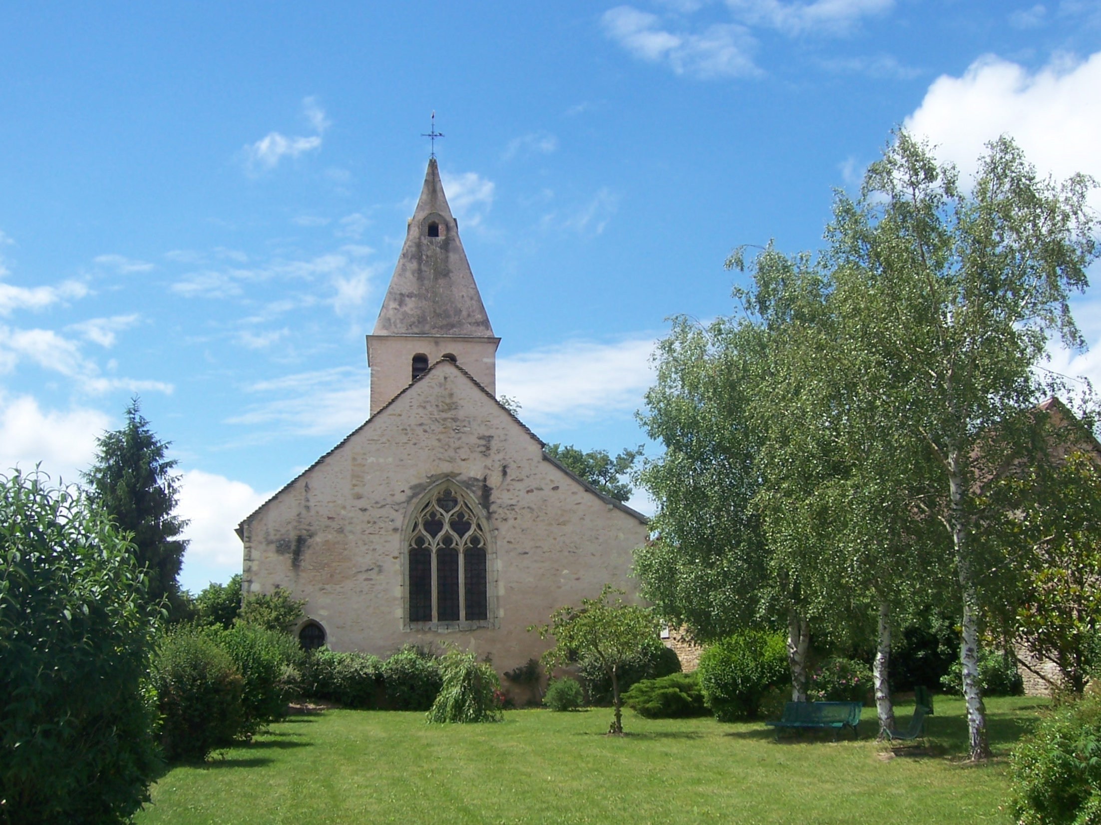 Eglise de Beaumont-sur-Grosne